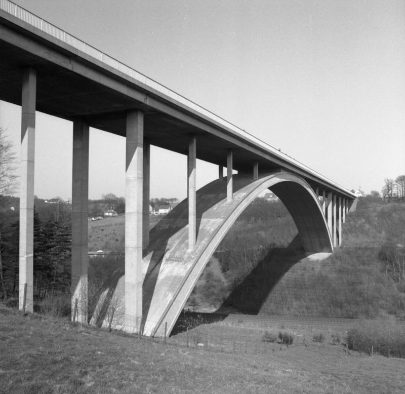 Blombachtalbrücke (bei Wuppertal-Elberfeld)